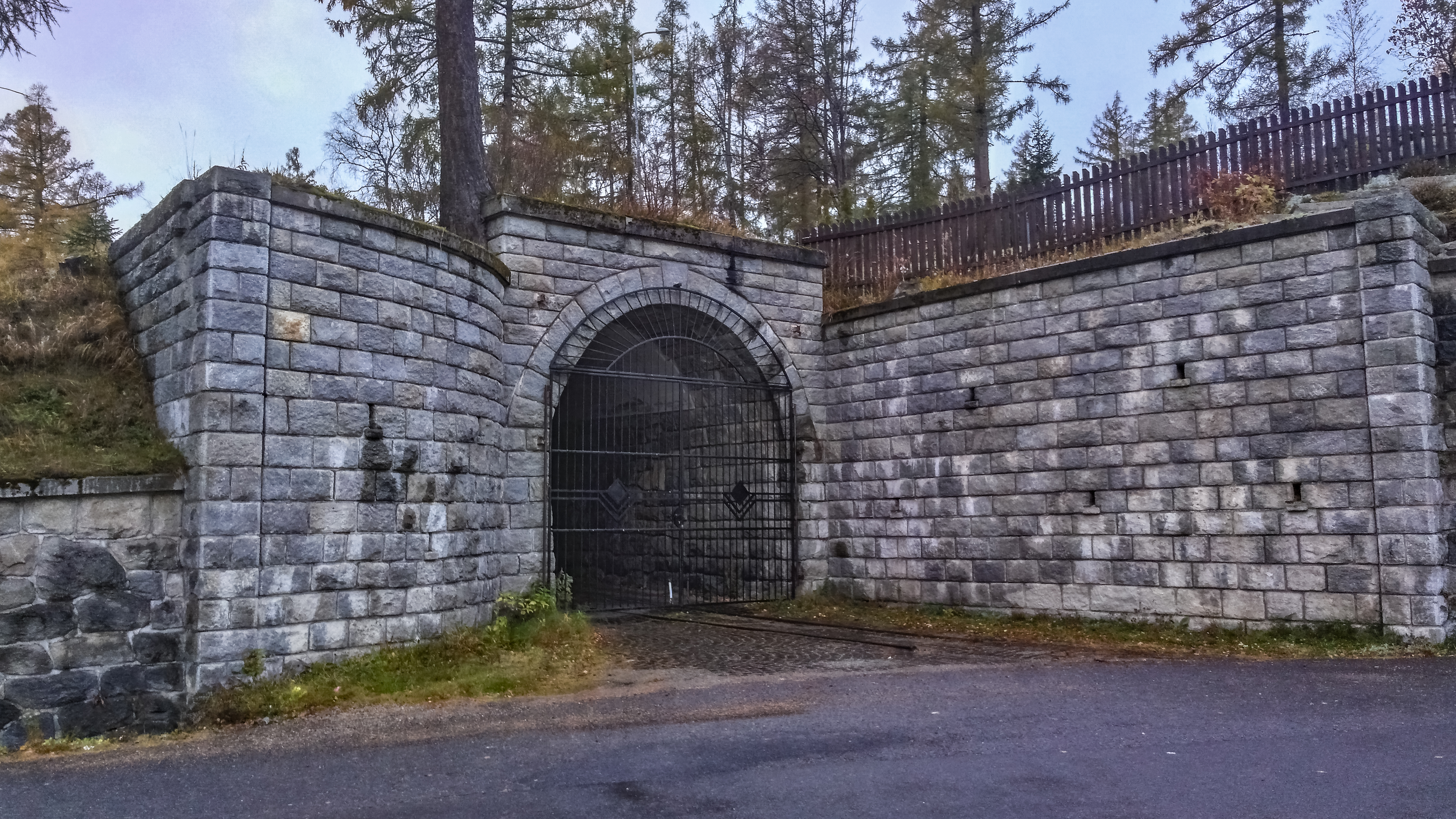 Tunel na bývalej vlečke vo Vyšných Hágoch